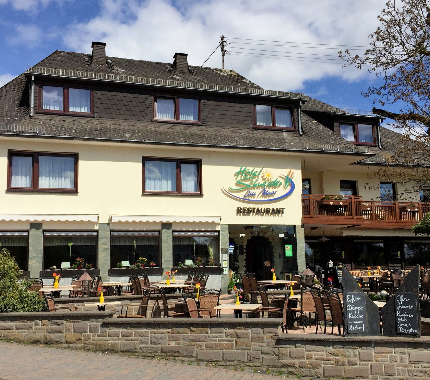 Hotel Schneider am Maar